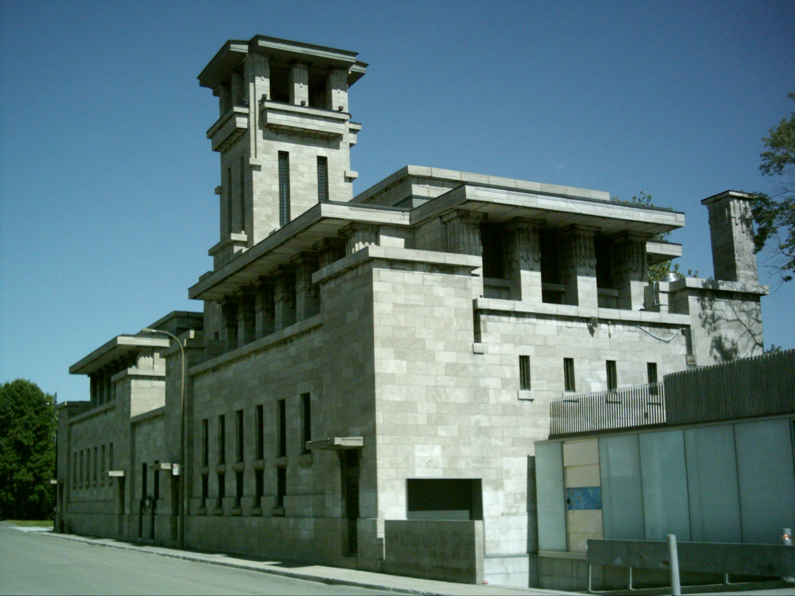 La caserne Letourneux au coin de la rue Notre-Dame devient le lieu de billetterie et abrite la salle Fred-Barry à partir de septembre 2008 pour le théâtre Denise-Pelletier. Maintenant le centre d'entrainement de soccer Centre Nutrilait.